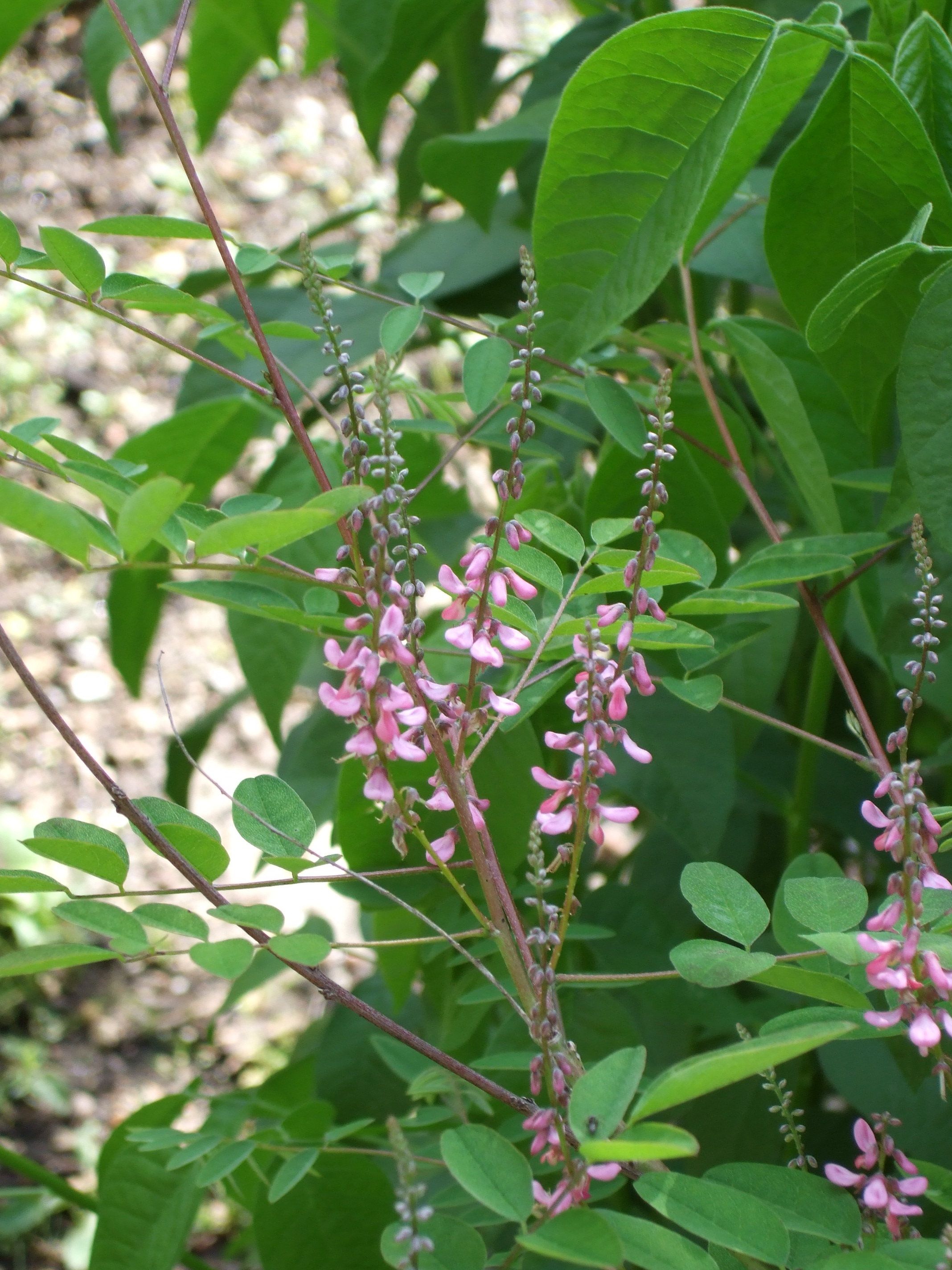 Schloss Hohenheim - Indigofera heterantha